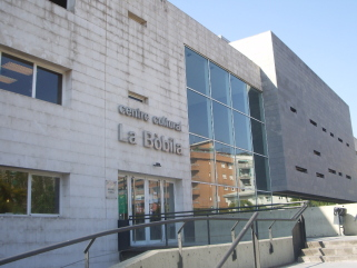 Fachada Centro Cultural La Bòbila